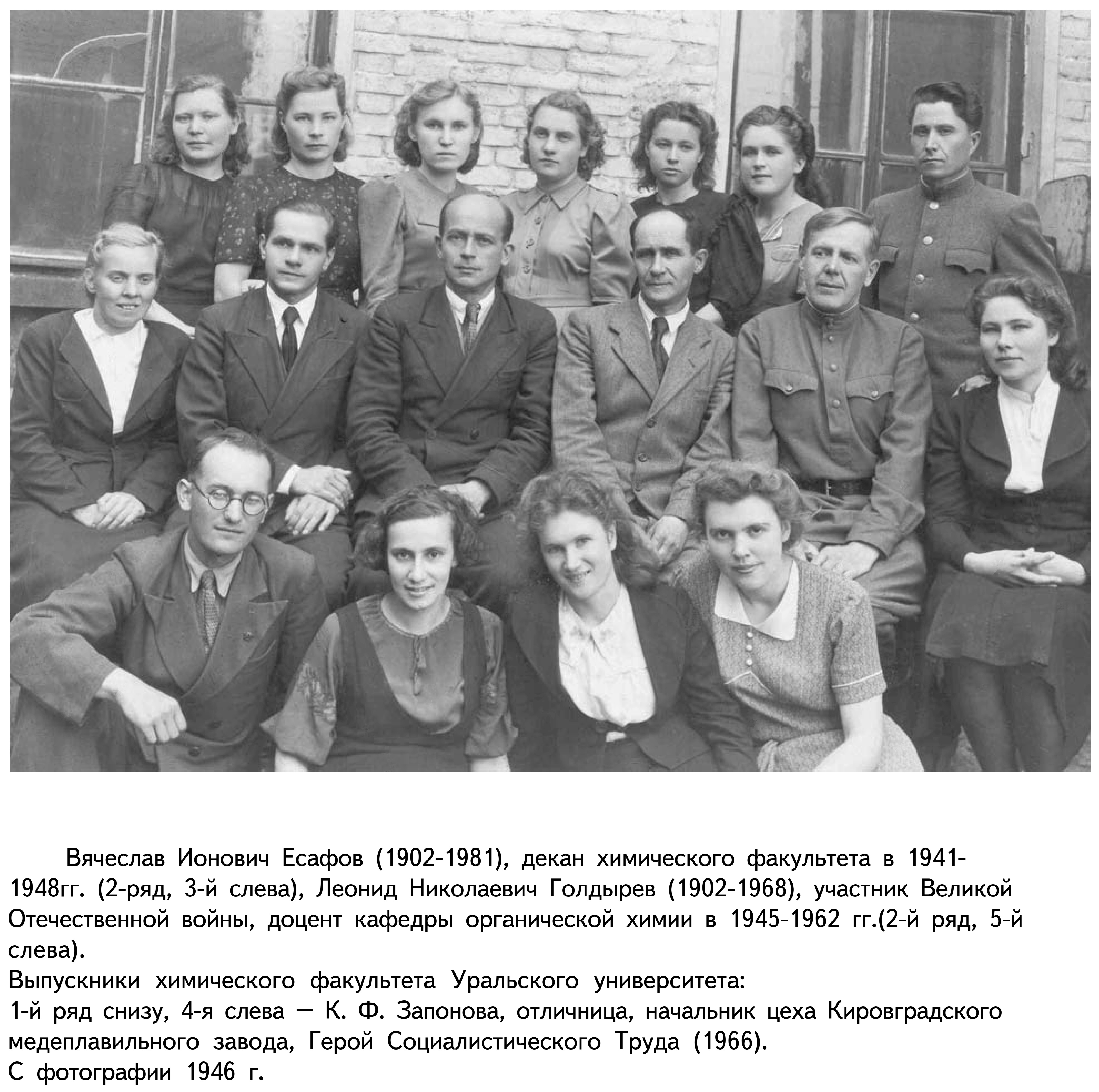 Преподаватели химического факультета Уральского университета: Вячеслав Ионович Есафов (1902—1981), декан химического факультета в 1941—1948 гг. (2-ряд, З-й слева), Леонид Николаевич Голдырев (1902—1968), участник Великой Отечественной войны, доцент кафедры органической химии в 1945—1962 гг.(2-й ряд, 5-й слева). Выпускники химического факультета Уральского университета 1946 года: 1-й ряд снизу, 4-я слева — Калерия Запонова, отличница, будущий начальник цеха Кировградского медеплавильного завода, Герой Социалистического Труда (1966)